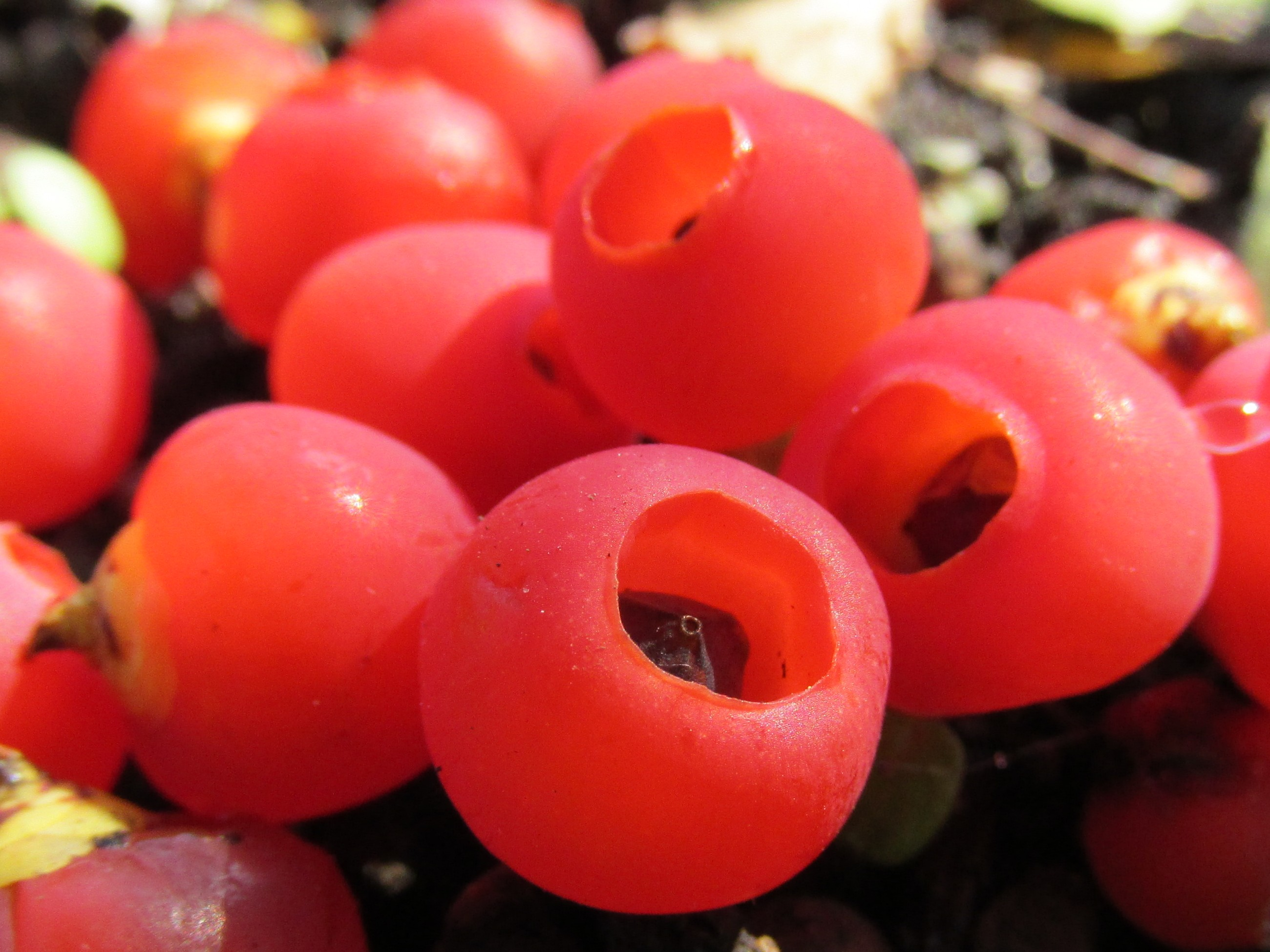 日本国,青森県青森市,イチイ,果実